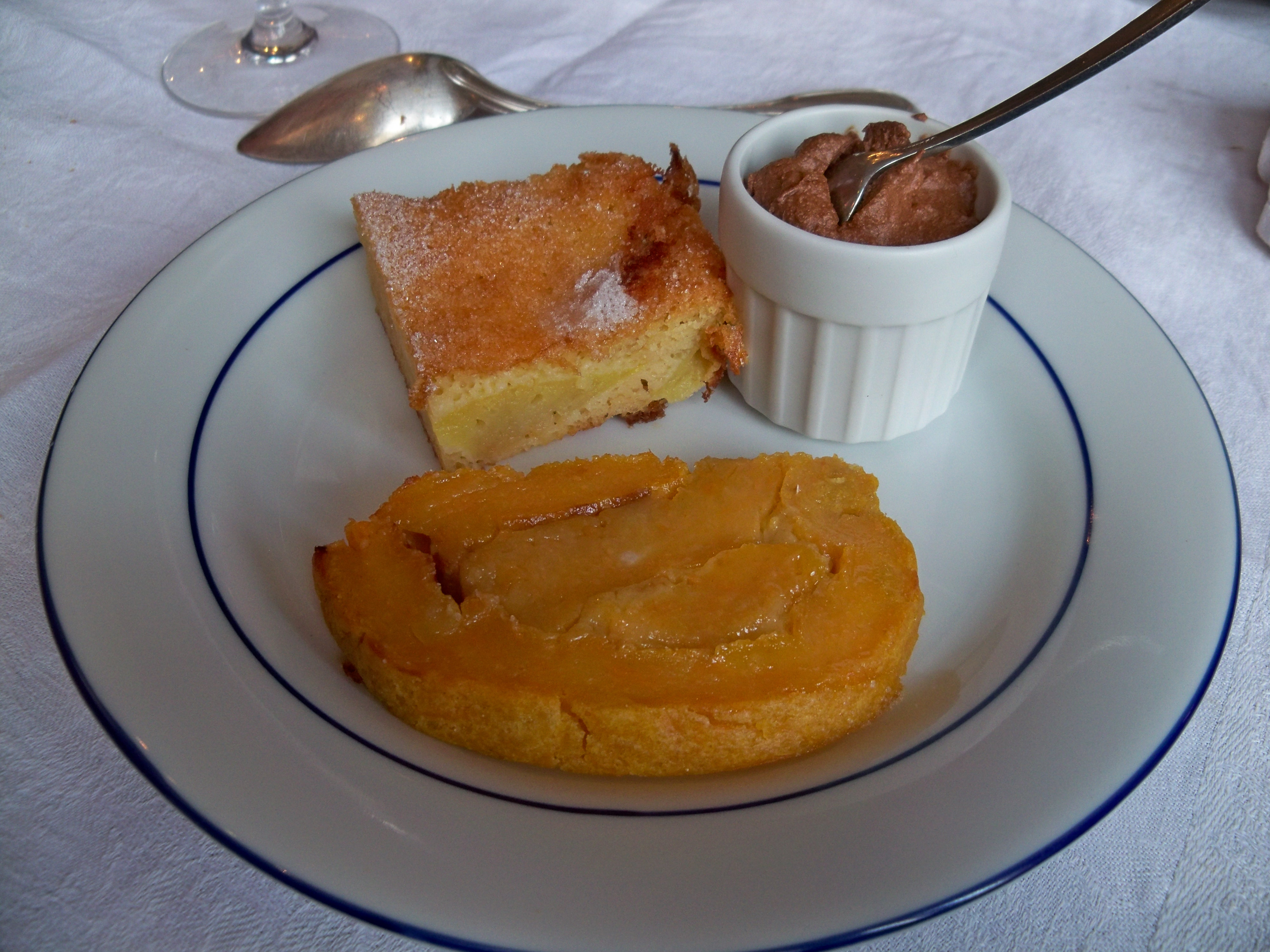 gateau de courge, gateau au pomme et mousse au chocolat au Café de la lavande de Lardiers (04)